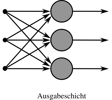 Schema eines künstlichen neuronalen Netzes mit einer Ebene und Feedforward-Eigenschaft.